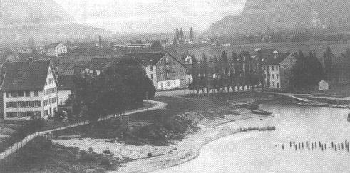 Walenstadtner Hafen vor 1905 - Im etwas kleinern Bild "Walenstadt_Hafen_vor_1905.jpg" sieht man noch die Pfosten des alten Dampfschiffsteges aus dem Wasser ragen! Dort landete noch der Delphin (der ja später unterging) und auch das Dampfschiff "Minerva", von dem auch ein Farbbild existiert. 47°7′41″N 9°18′6.2″E / 47.12806°N 9.301722°E